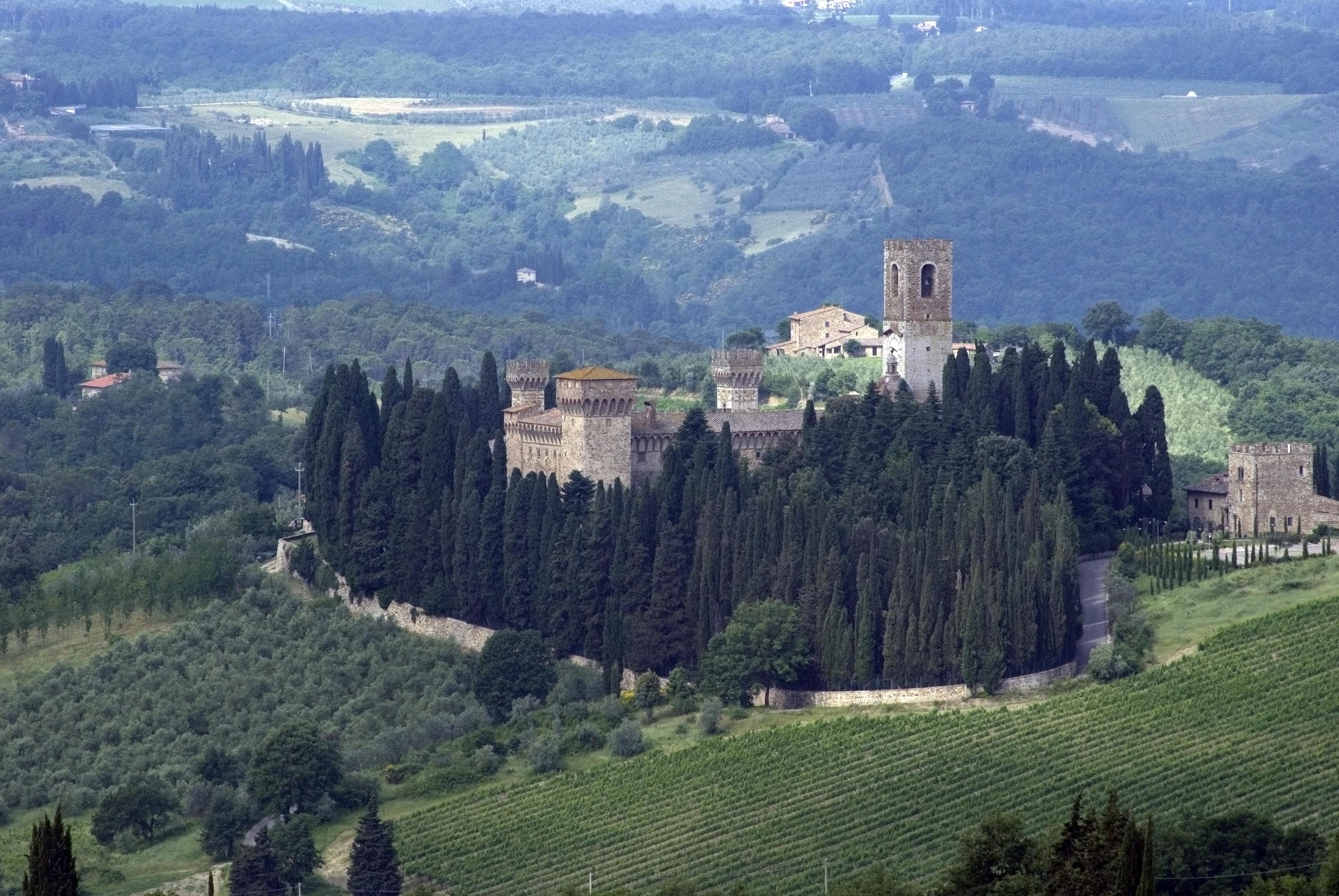 Panoram di Badia a Passignano